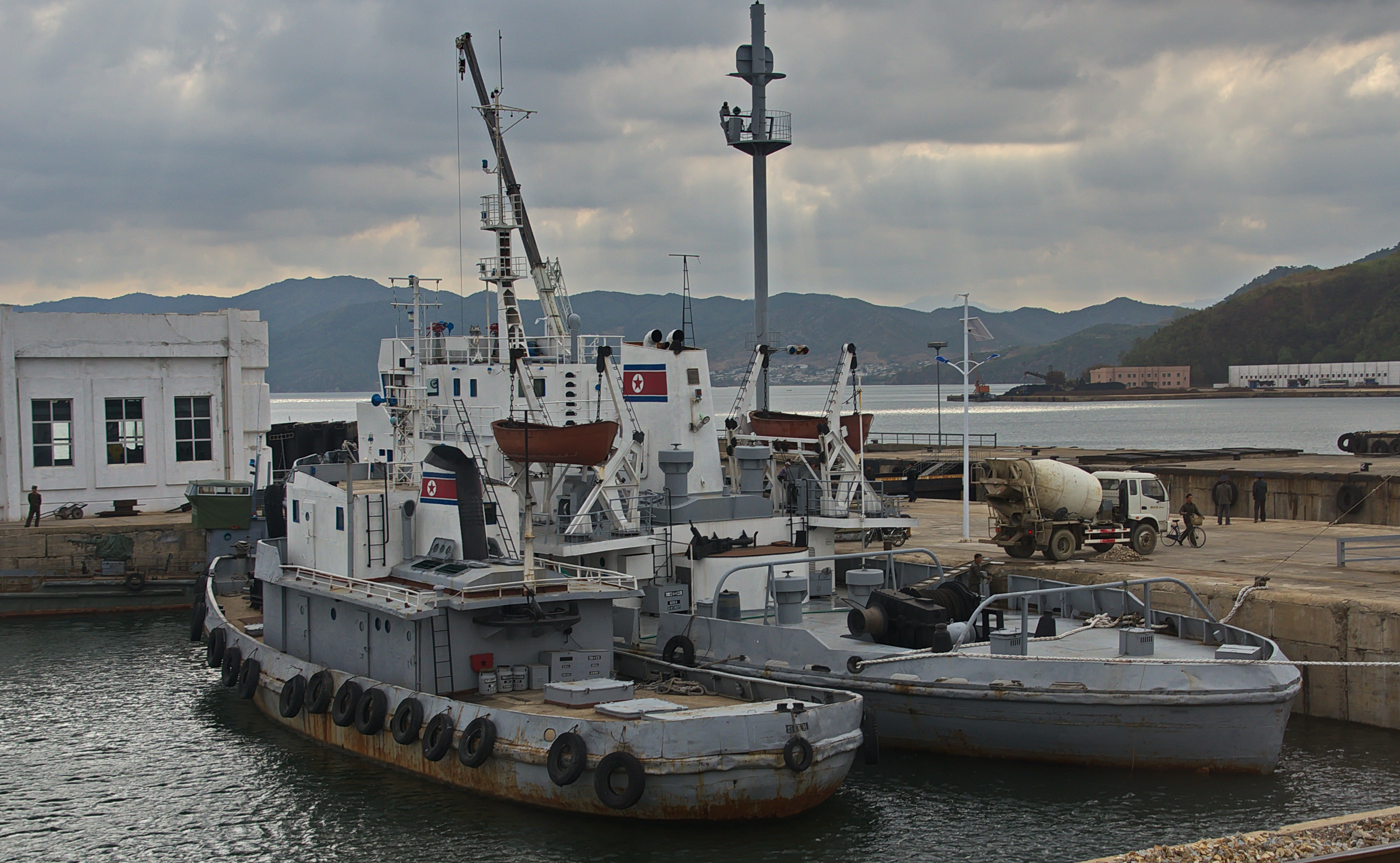 Nordkorea 2015 - Westmeer Sperrwerk